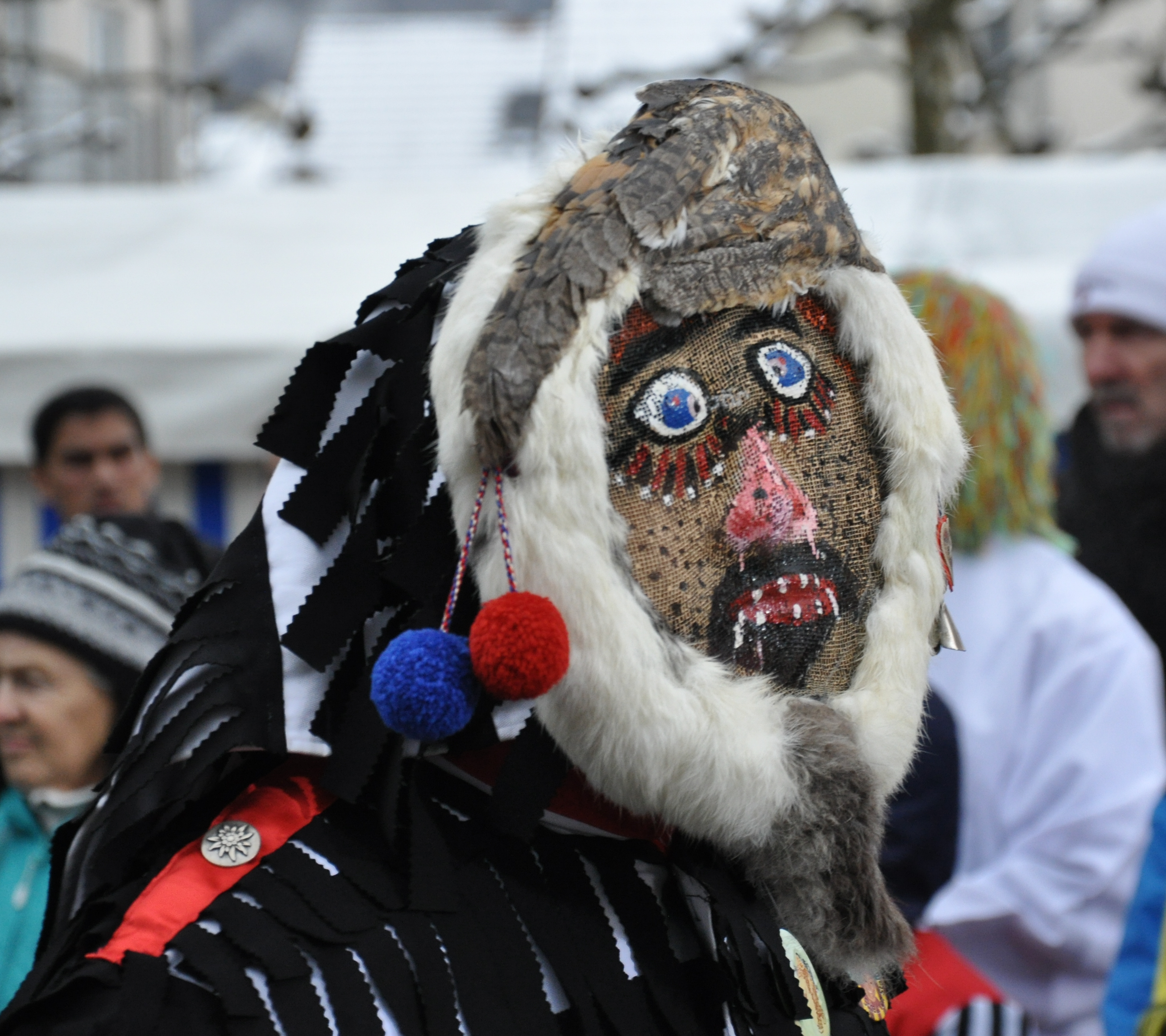 Urzelnzunft Sachsenheim (Landkreis Ludwigsburg), Narrenfigur: Urzel Fotografiert beim Landschaftstreffen der Vereinigung Schwäbisch-Alemannischer Narrenzünfte (VSAN) 2015 in Weingarten; Narrensprung am Sonntag, 25. Januar 2015